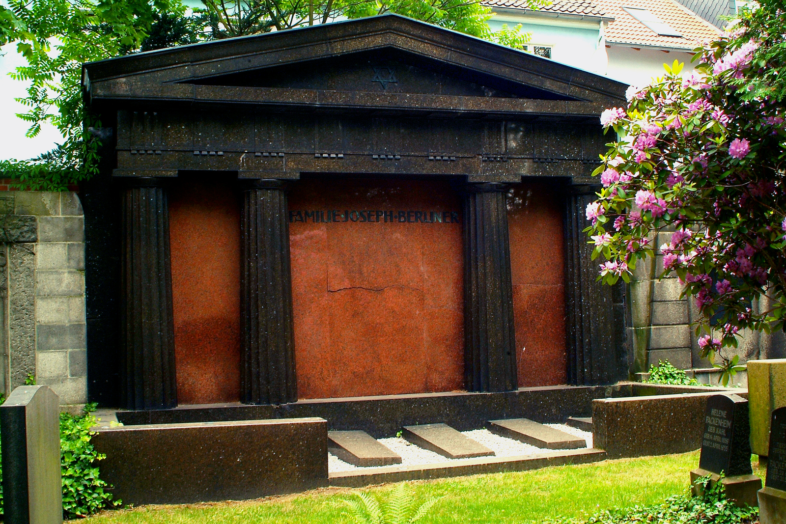 Das Grabmal der Familie von Joseph Berliner auf dem Jüdischen Friedhof An der Strangriede wurde von dem Architekten Wilhelm Mackensen entworfen.